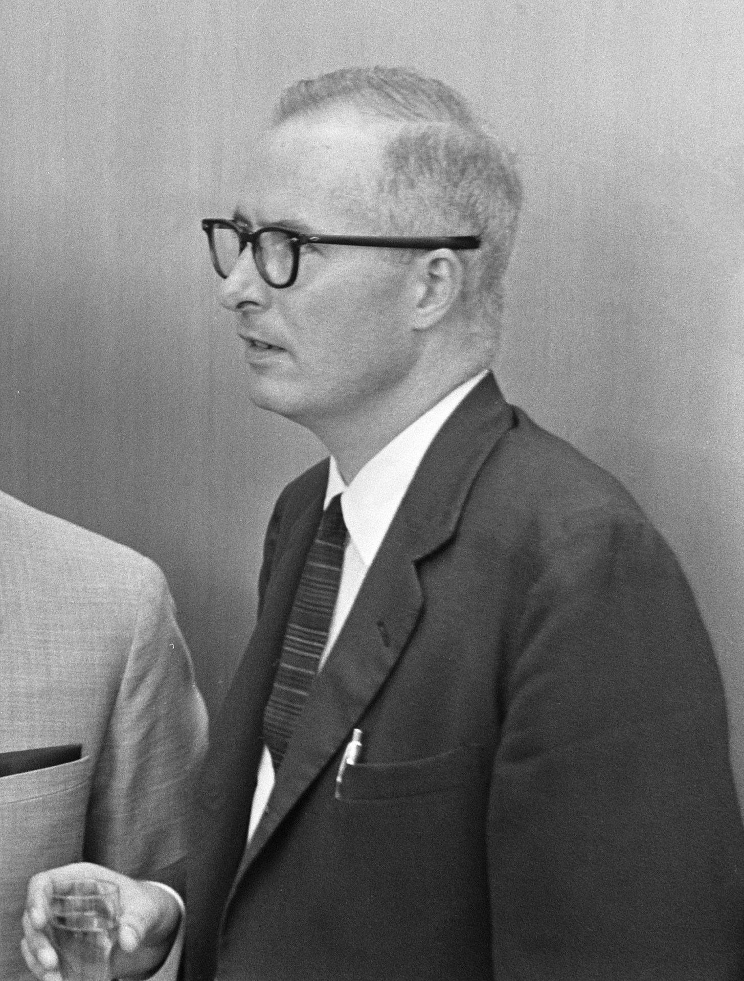 Robert Byrne, IBM-schaaktoernooi 1969